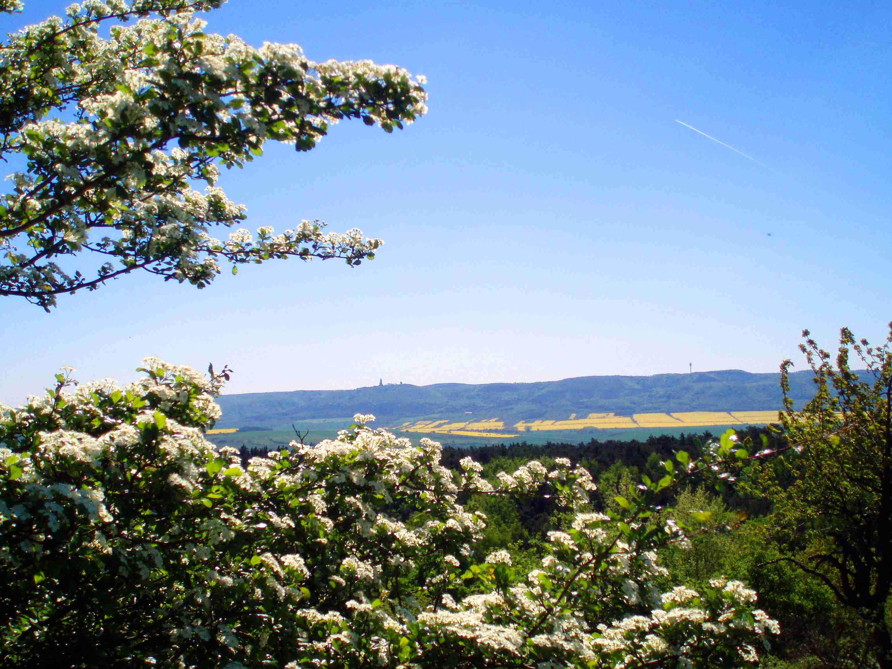 Blick von Questenberg zum Kyffhäuser